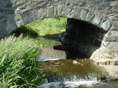 Aberdaron (Wales), Bridge over Cyll-y-felin